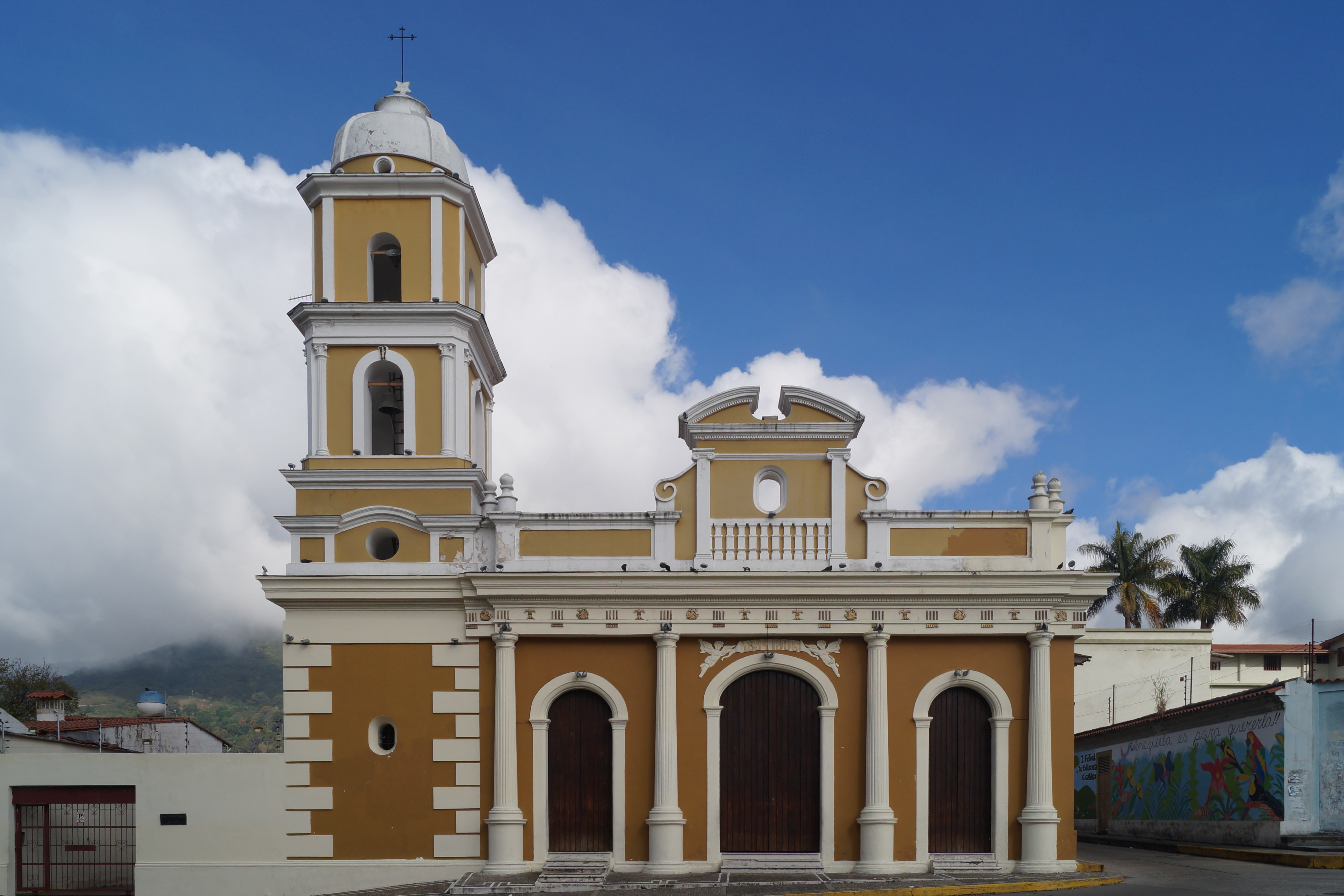 En el siglo XVII se había iniciado la conformación de Milla. Disponía de una capilla bajo la advocación de la Santa Cruz. En el año 1806 el sector se convierte en parroquia y se traslada la capilla bajo la advocación de San Juan Bautista. Luego fue destruída por el terremoto de 1894, y el mismo año comienza la reconstrucción de la iglesia sobre las bases de la ya destruída. En 1906 queda concluida la obra. En 1970 se inicia una restauración (Columna, muros, techo). Su orden arquitectónico esta ubicado dentro de las iglesias coloniales y republicanas, época en la que el país estaba en renovación de las formas clásicas del arte, por lo que en ella se observa una simetría y una pureza neoclásica con destellos barrocos. Mérida. Venezuela.